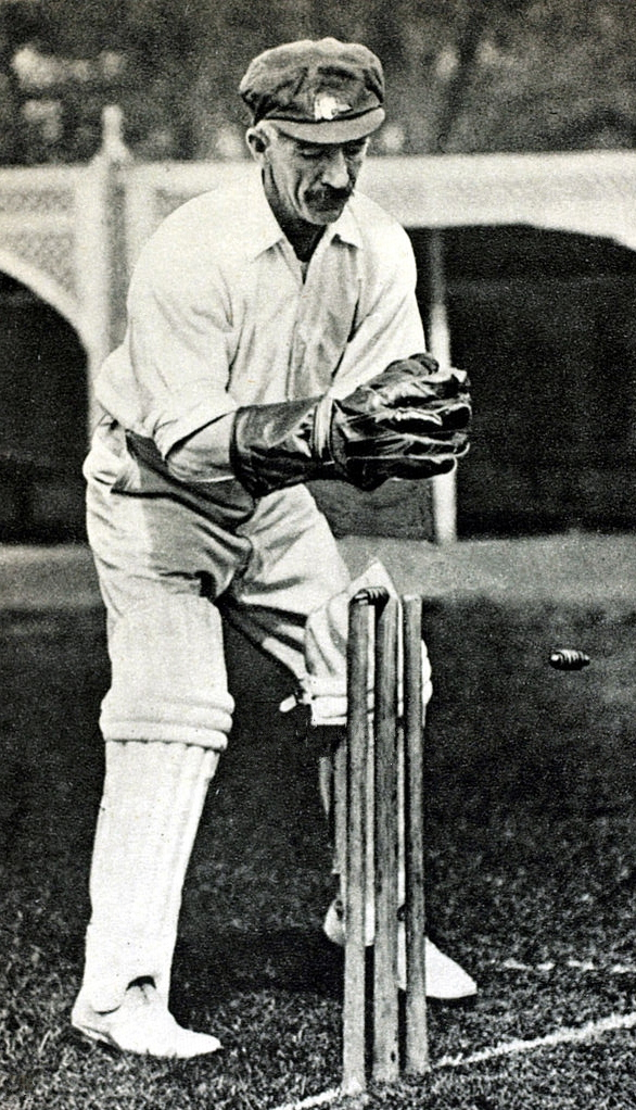 Hanson Carter keeping